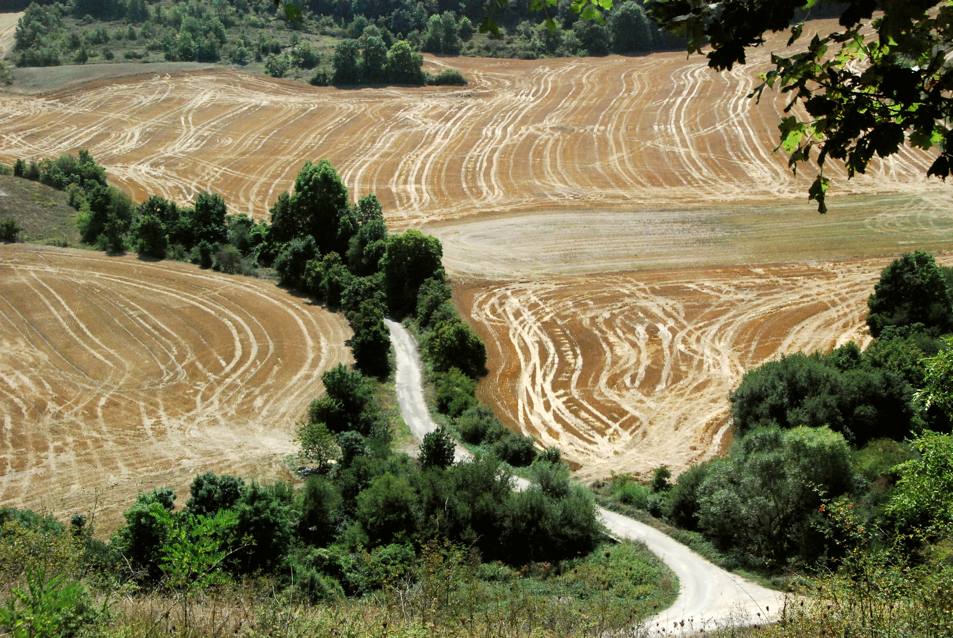 Arabako Harana udalerriko Kontrasta kontzejuko panoramika